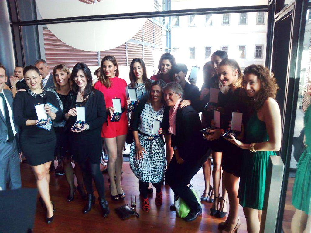 Las gimnastas del conjunto español de gimnasia rítmica campeón olímpico en Atlanta 1996 (las Niñas de Oro), el conjunto de 2015 y la periodista Paloma del Río, en la entrega de las Medallas y Placas de la Real Orden del Mérito Deportivo el 14 de octubre de 2015 en el Museo Nacional Centro de Arte Reina Sofía de Madrid.